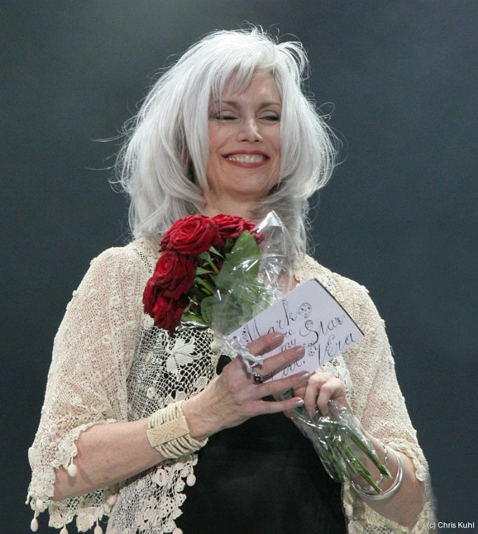 Emmylou Harris in Ahoy Rotterdam 2006, foto: C. Kuhl /